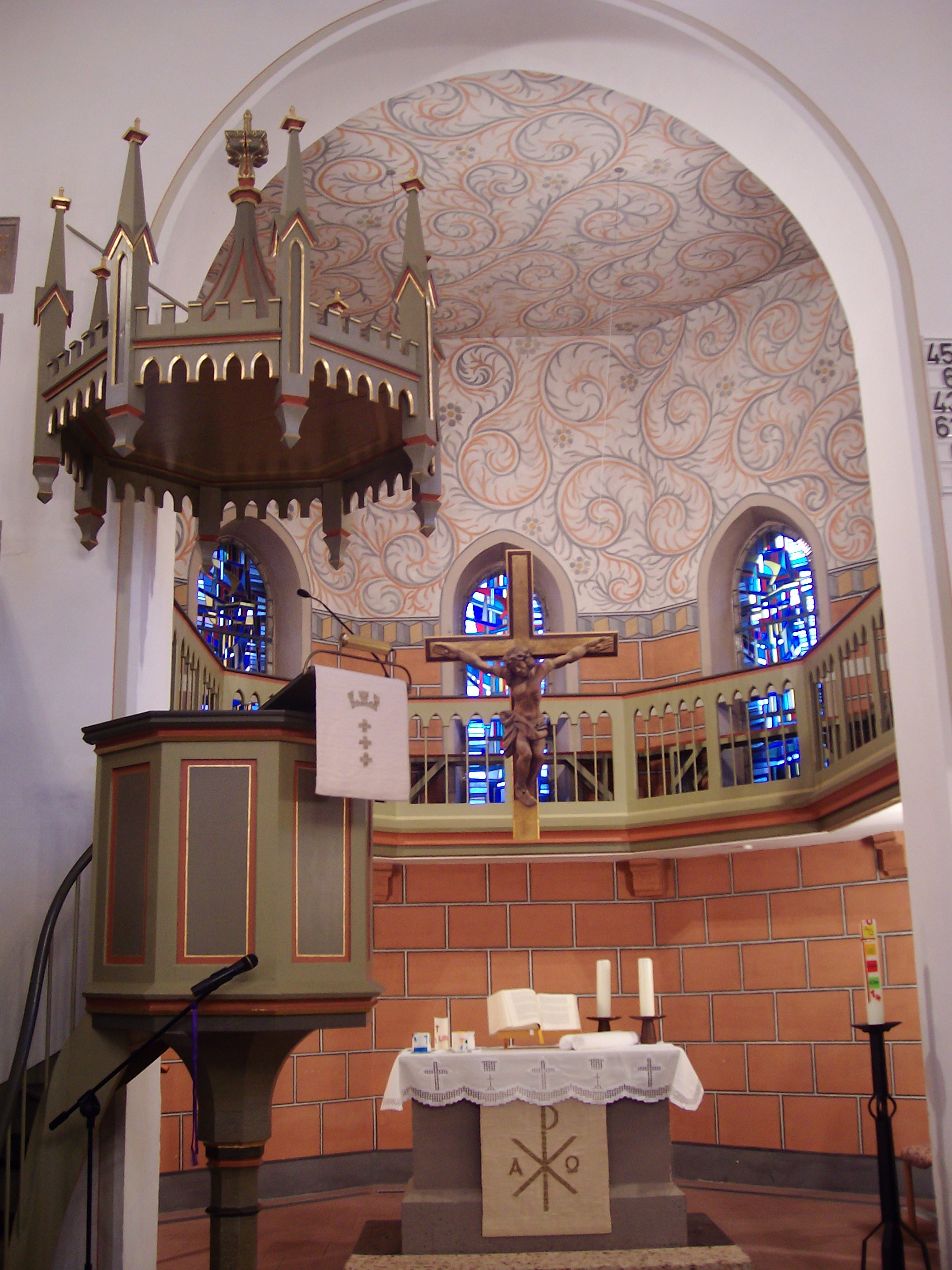 Evangelische Kirche Weitershain, Grünberg, Landkreis Gießen, Hessen, Deutschland